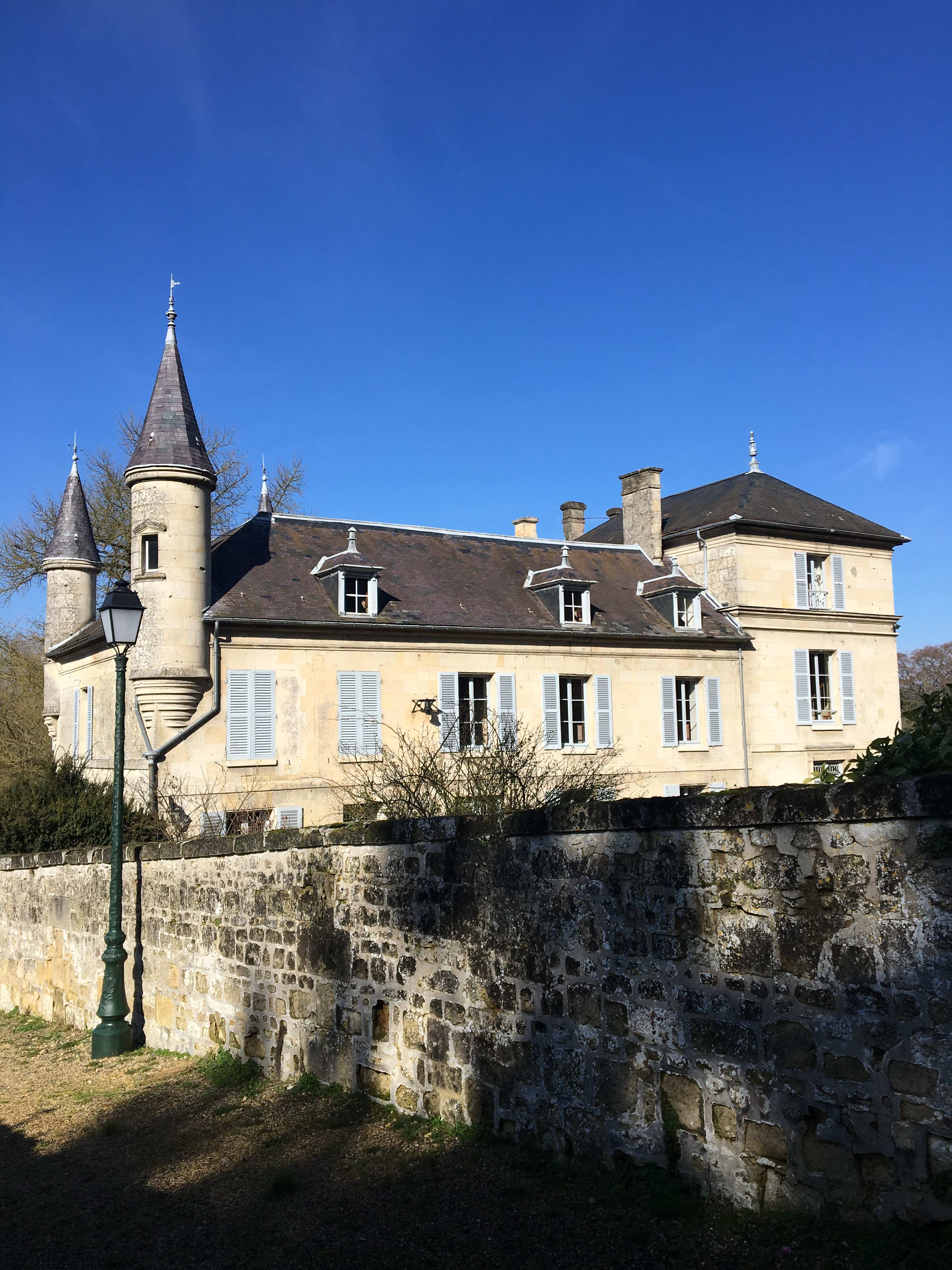 Château de l'Ortois, Jaulzy, Soissonnais